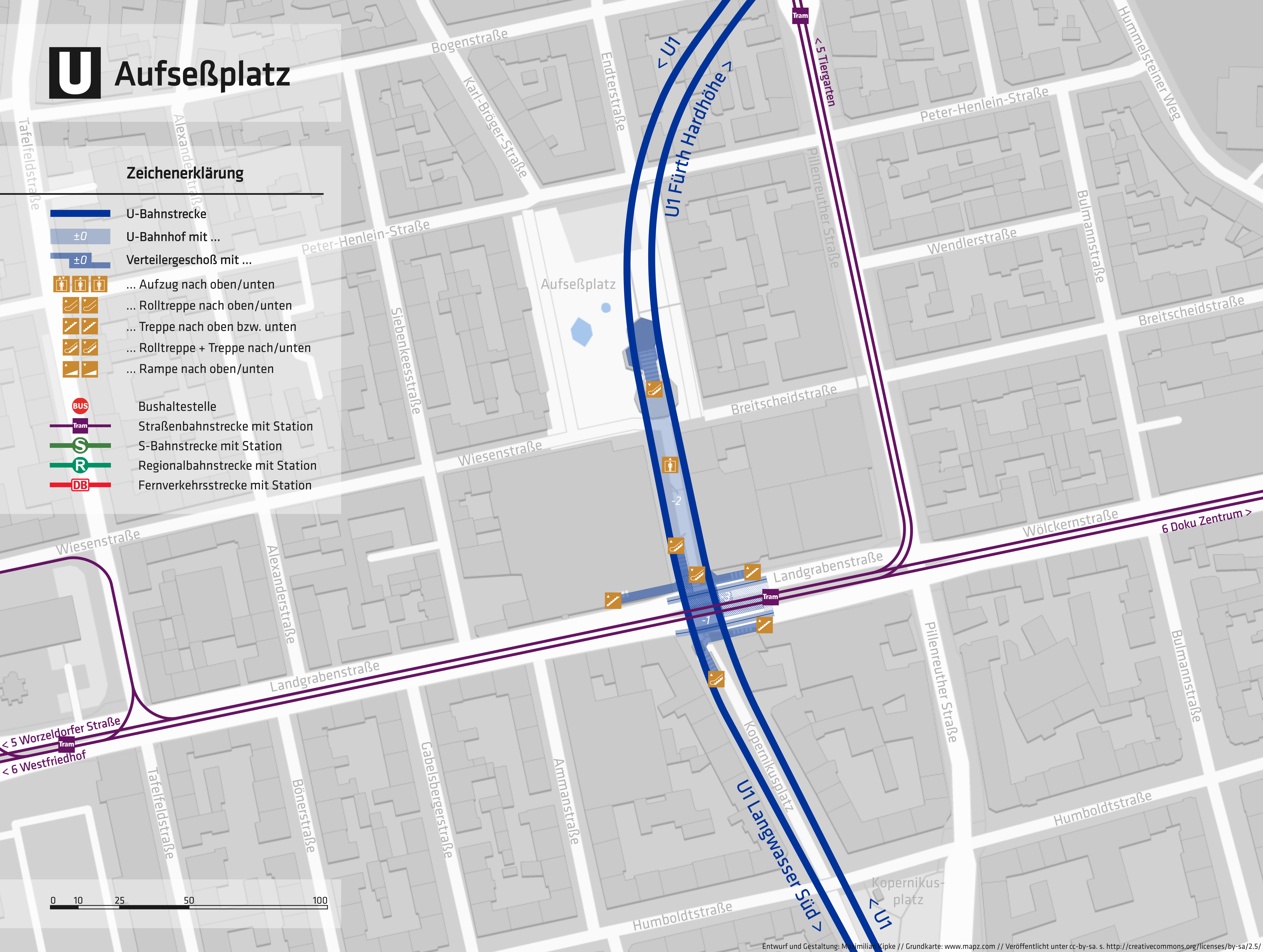 Übersichtsplan U-Bahnhof Aufseßplatz in Nürnberg